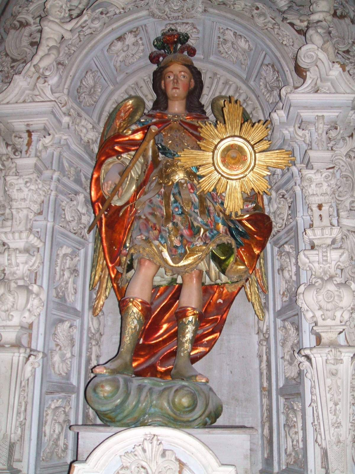 Concatedral de San Pedro, Soria (Castilla y León, España)